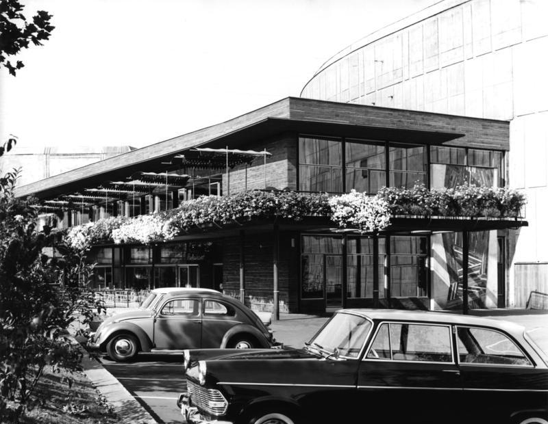 11.-16. September 1961 Stuttgart - Liederhalle